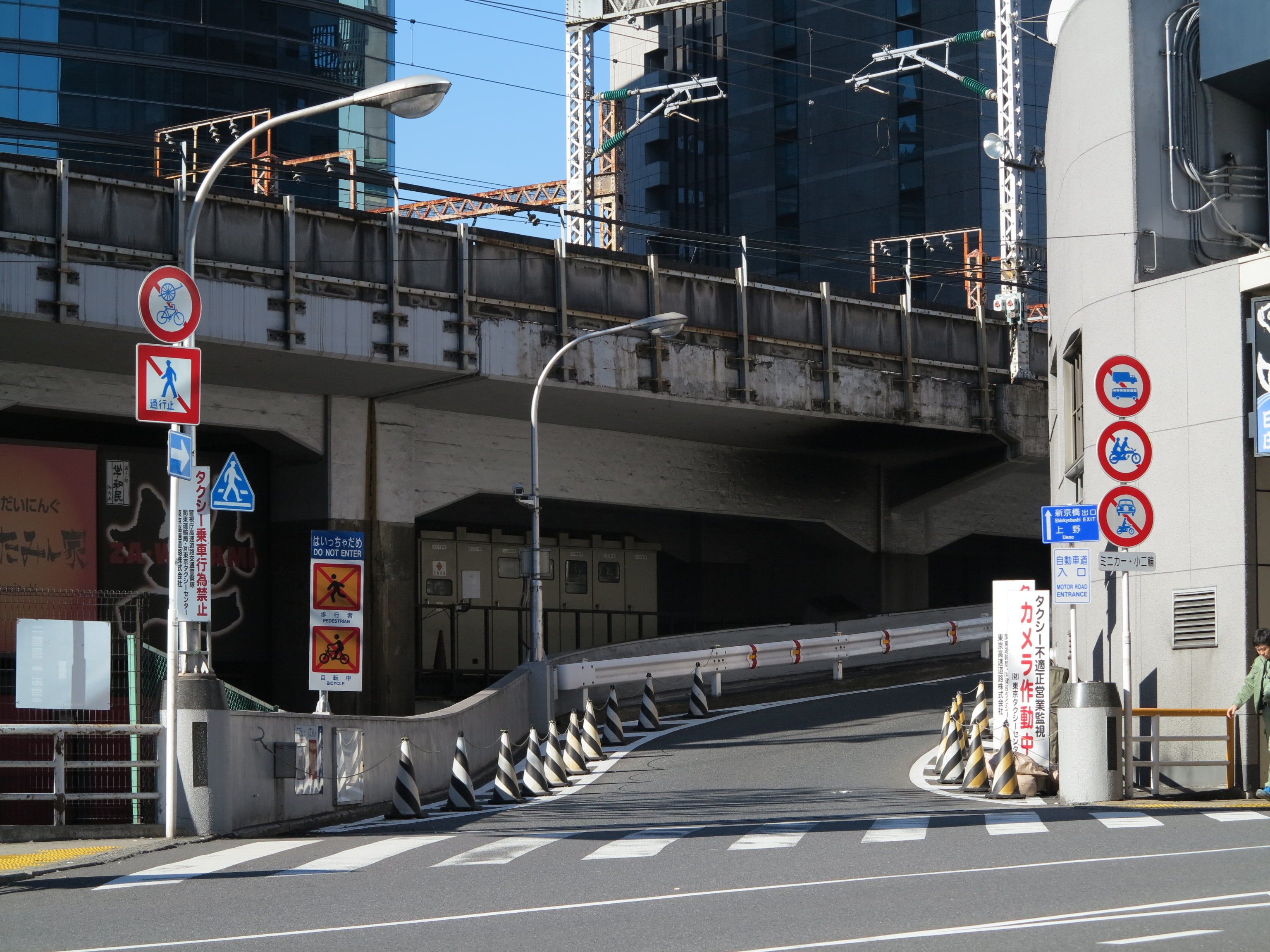 東京高速道路の土橋入口